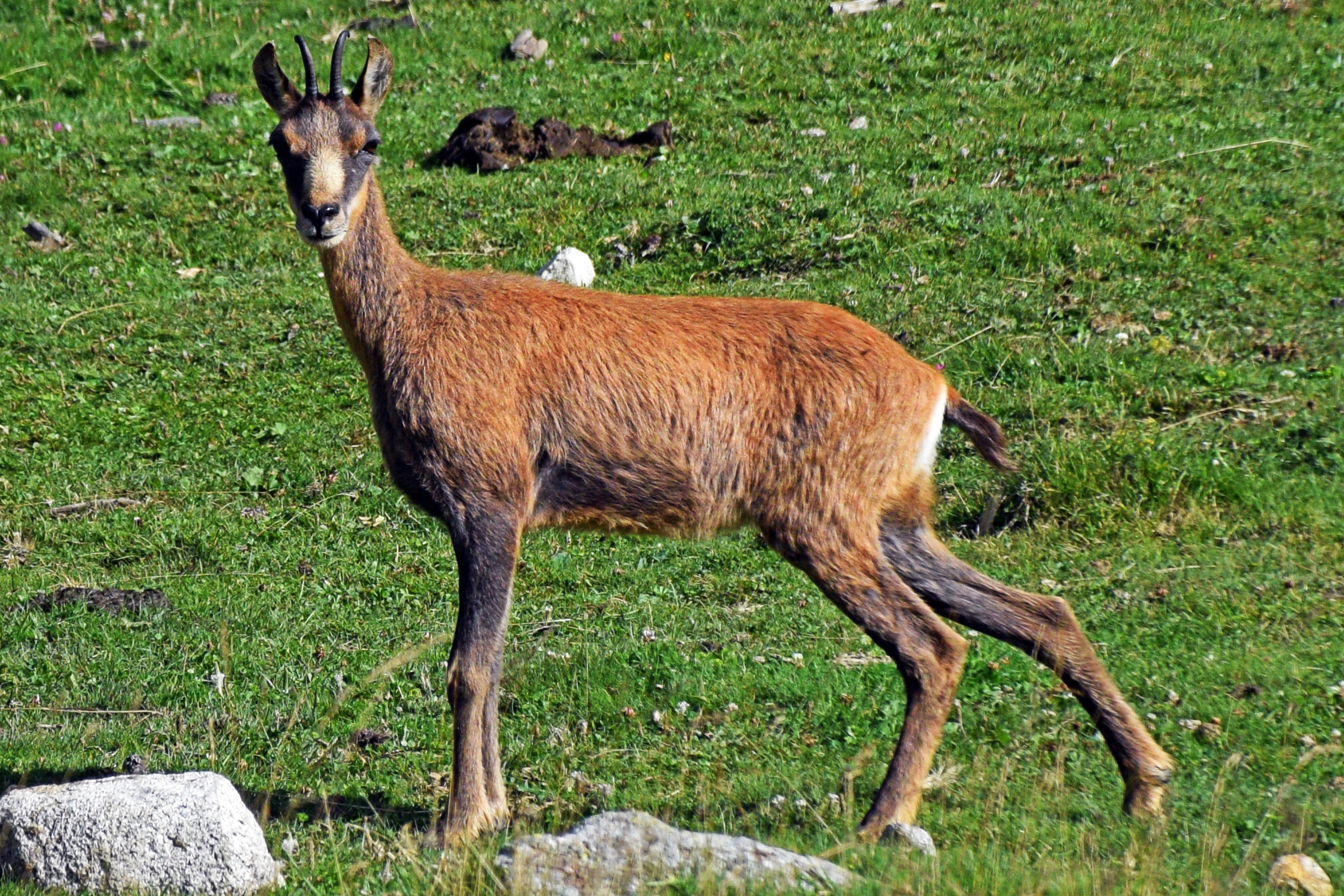 Rebeco en Aigüestortes